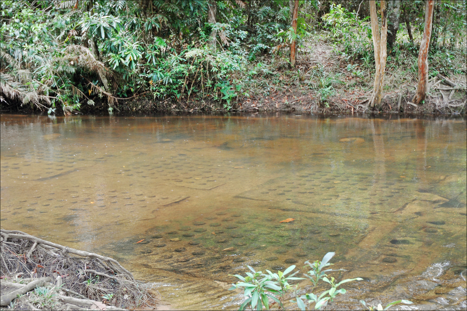 Le Phnom Kulen est la montagne sacrée des khmers. Elle est située à 50 Km de Siem Reap et domine la plaine où se trouvent les grands temples. Les rivières, qui coulent à Angkor, prennent leurs sources dans cette montagne. C'est dans ce site naturel, très étendu et facilement défendable, qu'est né le royaume khmer en 802 proclamé par le Roi Jayavarman II qui a rendu son pays indépendant de la tutelle de Java. Au sommet de la montagne, une petite pagode construite au sommet d'un rocher (487 m) abrite un Bouddha couché, qui est devenu un lieu de pèlerinage pour les Cambodgiens. D'anciens temples khmers en ruine datant du IXème siècle sont visibles au bord de la rivière qui prend sa source.à proximité. Dans le lit de la rivière, à proximité de la source, les anciens khmers ont sculpté des Linga (représentations symboliques de Shiva) et des figures de Vishnou allongé sur le serpent Ananta. C'est en coulant sur les Linga que l'eau devient sacrée. Ce site, qui est classé parc naturel, comprend plusieurs cascades et des espaces de détente qui sont fréquentés par les Cambodgiens durant leurs loisirs. Une route privée en très mauvais état mais payante pour les étrangers permet d'accéder au plateau, il est recommandé de ne pas sortir des sentiers car le territoire n'a pas été complètement déminé. Hors des circuits touristiques en raison de sa distance aux hôtels de Siem Reap et des difficultés d'accès, Phnom Kulen est très peu visité par les étrangers et ne figure pas dans la plupart des guides sur le Cambodge alors qu'il est classé au patrimoine mondial. Article Wikipedia sur le Phnom Kulen